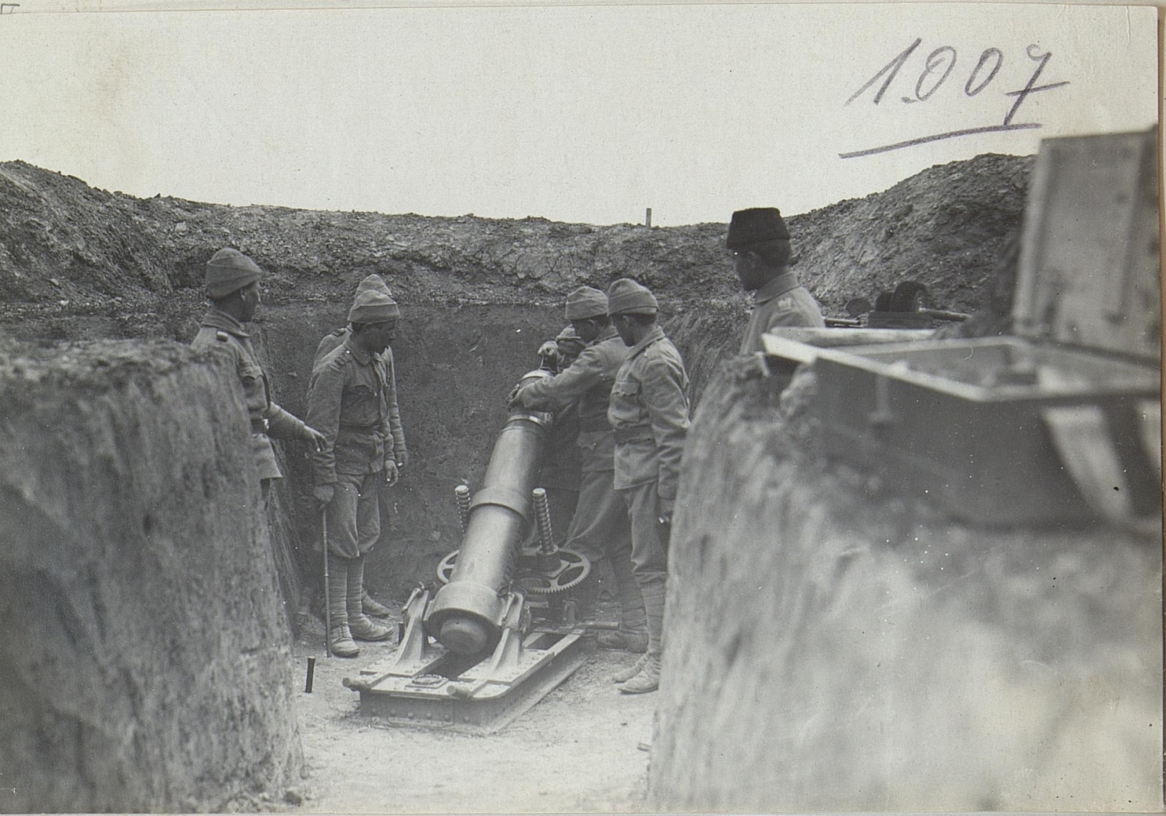 22 cm-Minenwerfer beim ottom.Korps: Laden der Mine.